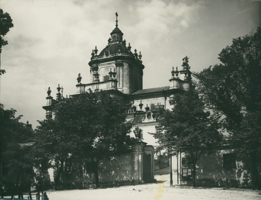 Katedra św. Jura we Lwowie [ca 1930] 1 fot. : odb. na pap. srebrowo-żelatynowym ; 11,7x15,1 cm